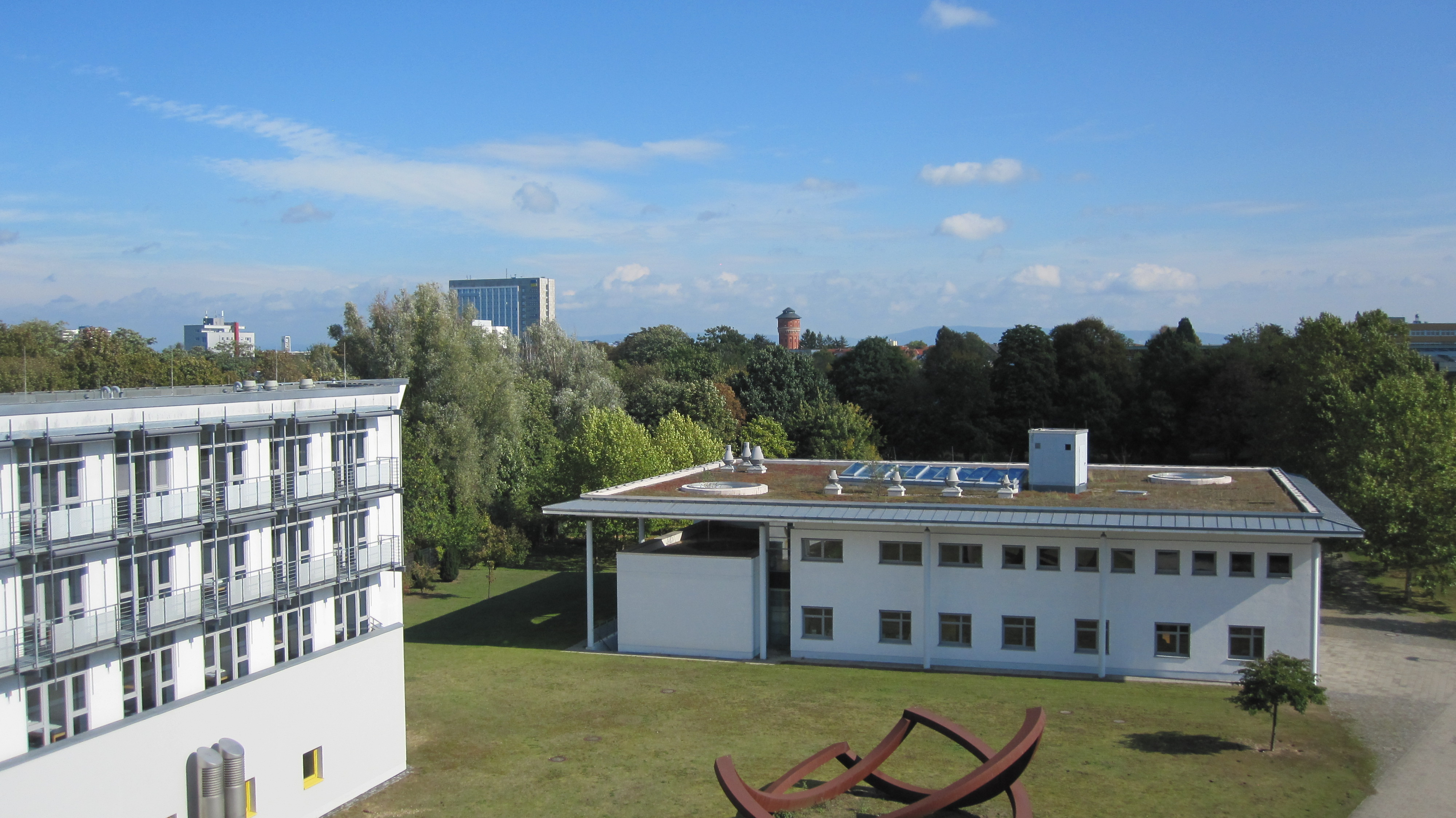 Fortbildungszentrum Speyer des Pädagogischen Landesinstituts Rheinland-Pfalz, Otto-Mayer-Str. 14, Speyer. Aufgenommen vom Dach des Gästehauses Otto Mayer der Deutschen Universität für Verwaltungswissenschaften Speyer. Im Hintergrund der Speyerer Wasserturm.